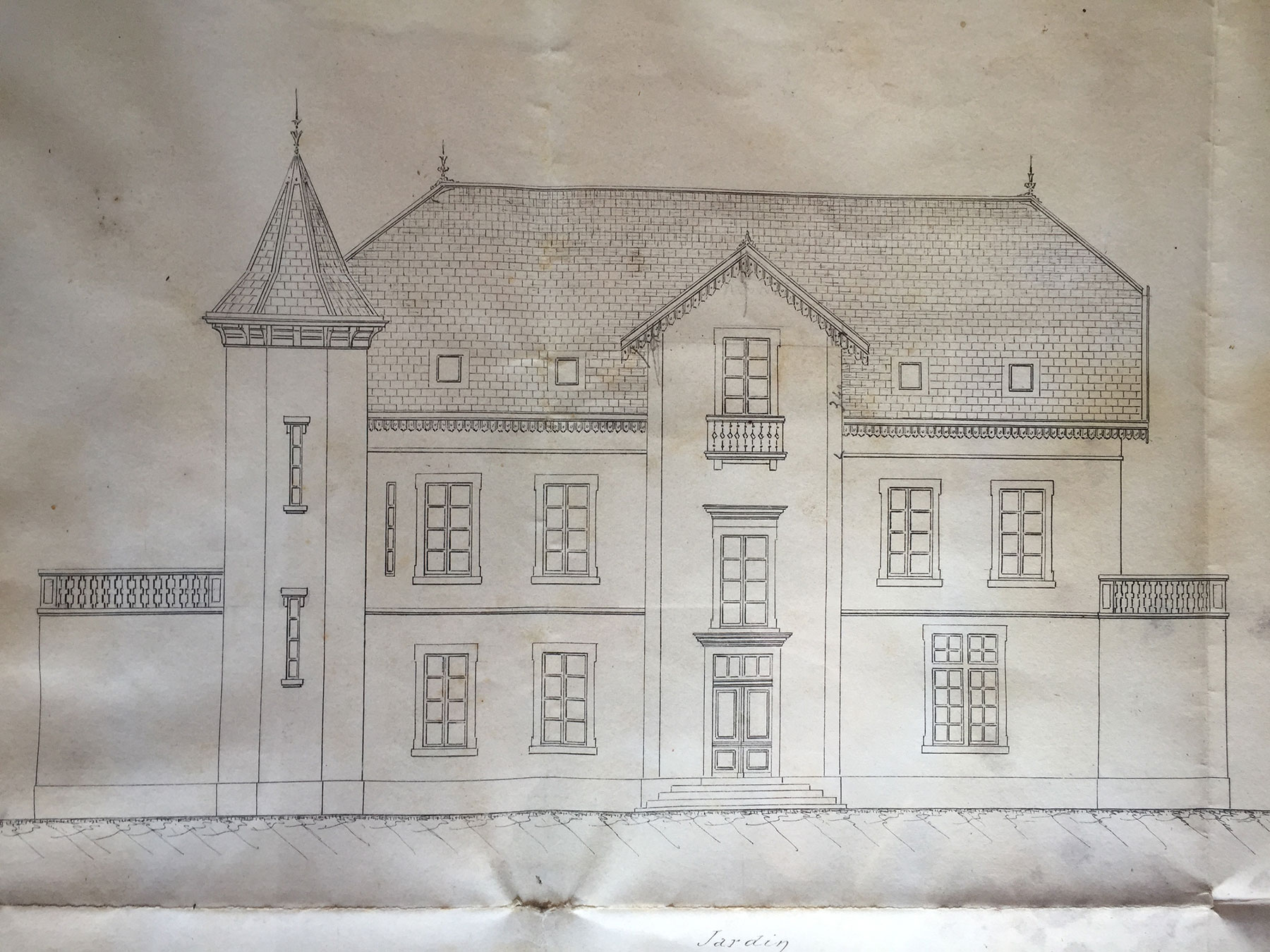 Plan de la facade